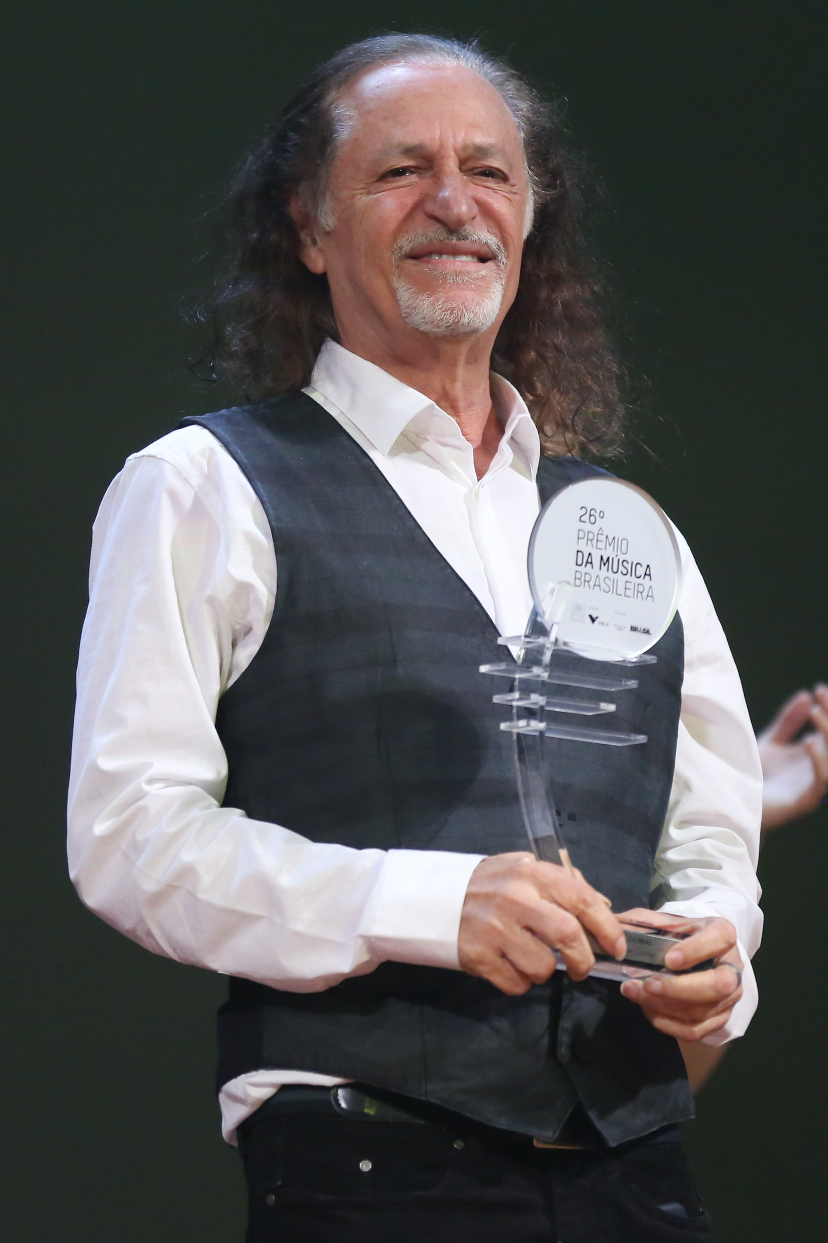 Prêmio Regional / Melhor Cantor - Alceu Valenca - 26° Prêmio da Música Brasileira 2015, no Theatro Municipal, no Centro do Rio de Janeiro/RJ. (10/06/15) Foto: Roberto Filho/Divulgacão